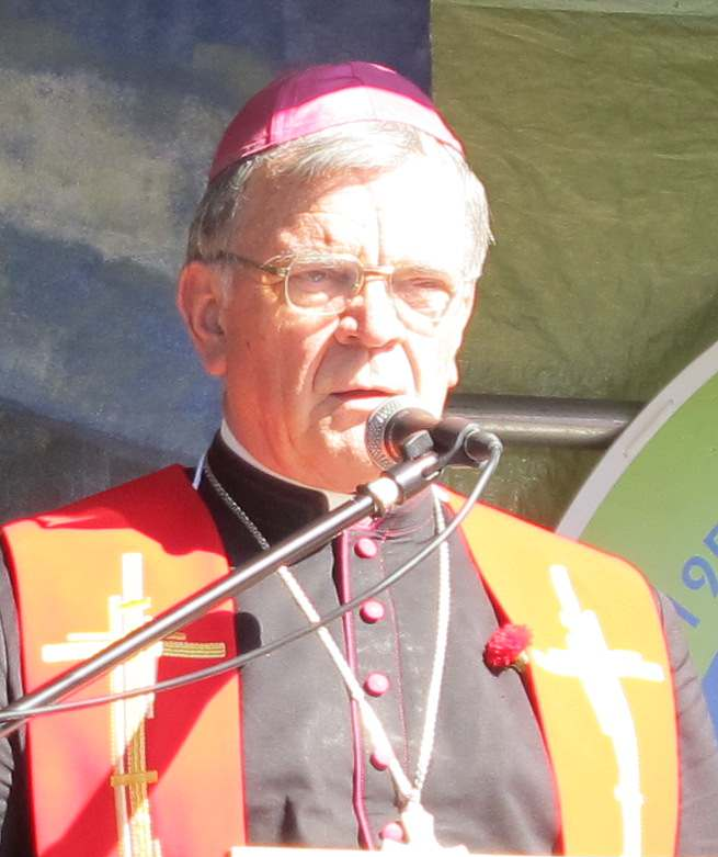 Slovesnost ob 60. obletnici ustanovitve PGD Škale.